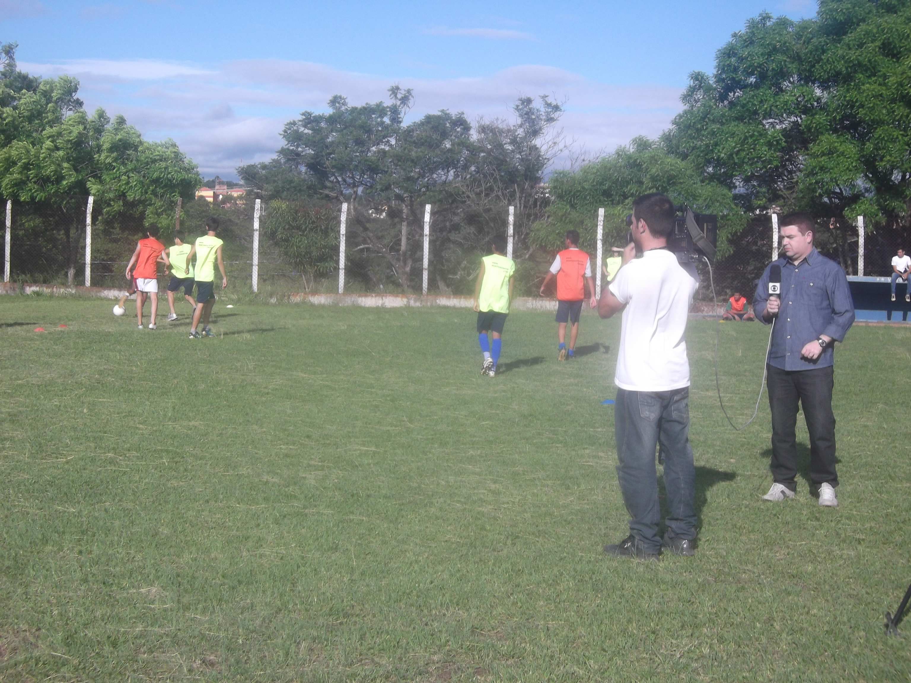 Repórteres da TV Tem em matéria no Centro de Treinamento da Associação Desportiva Social Votorantim